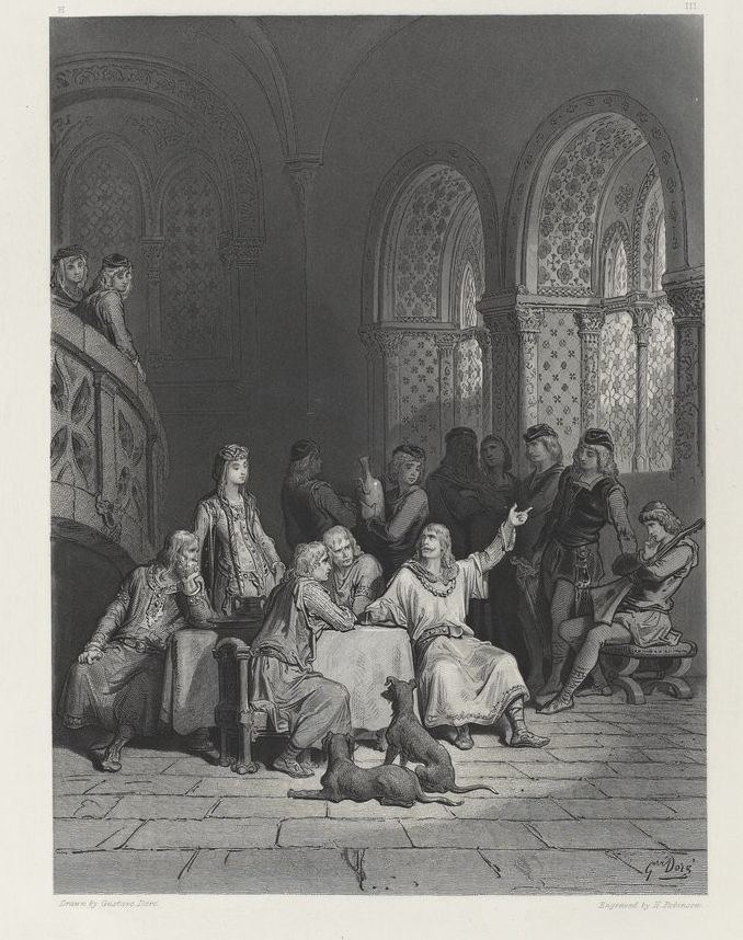 Il parla et se tut. La jeune Élaine au teint de lis, gagnée par la voix mélodieuse qu'elle entendait avant d'avoir regardé, leva les yeux et lut sur les traits de Lancelot.